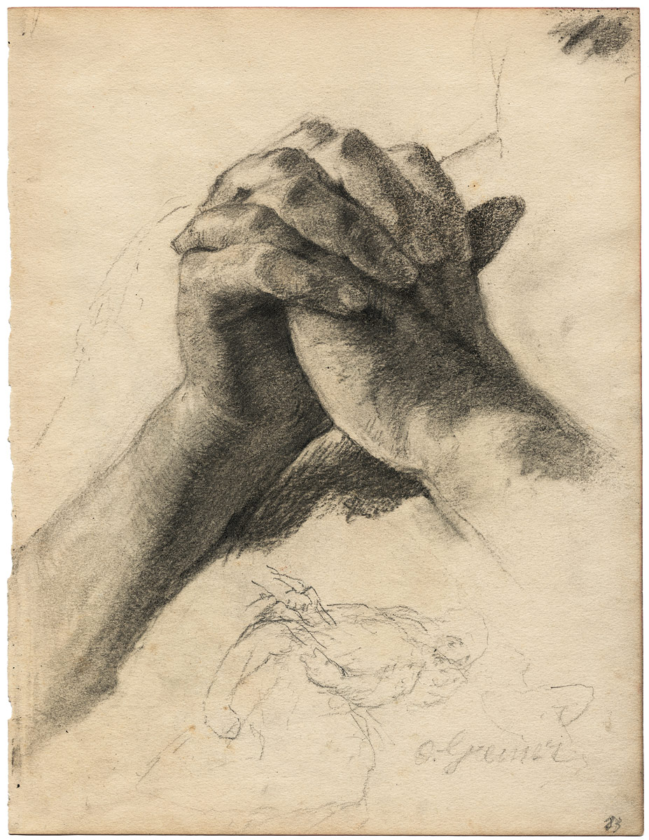 Betende Hände. Bleistift und Kohle auf Velin. 30 x 22,8 cm